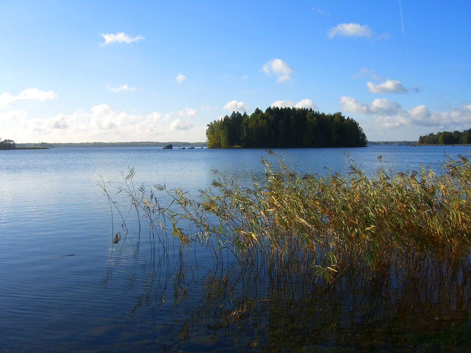 Erken, foto från nordsidan